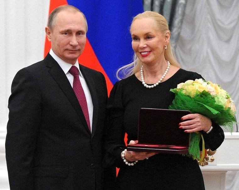 На церемонии вручения государственных наград Российской Федерации. Почётное звание «Заслуженный работник культуры России» присвоено редактору Москонцерта Нинель Кобзон.